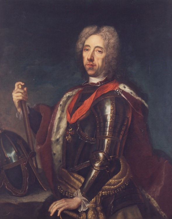 Porträt des Prinzen Eugen von Savoyen (1663-1736)